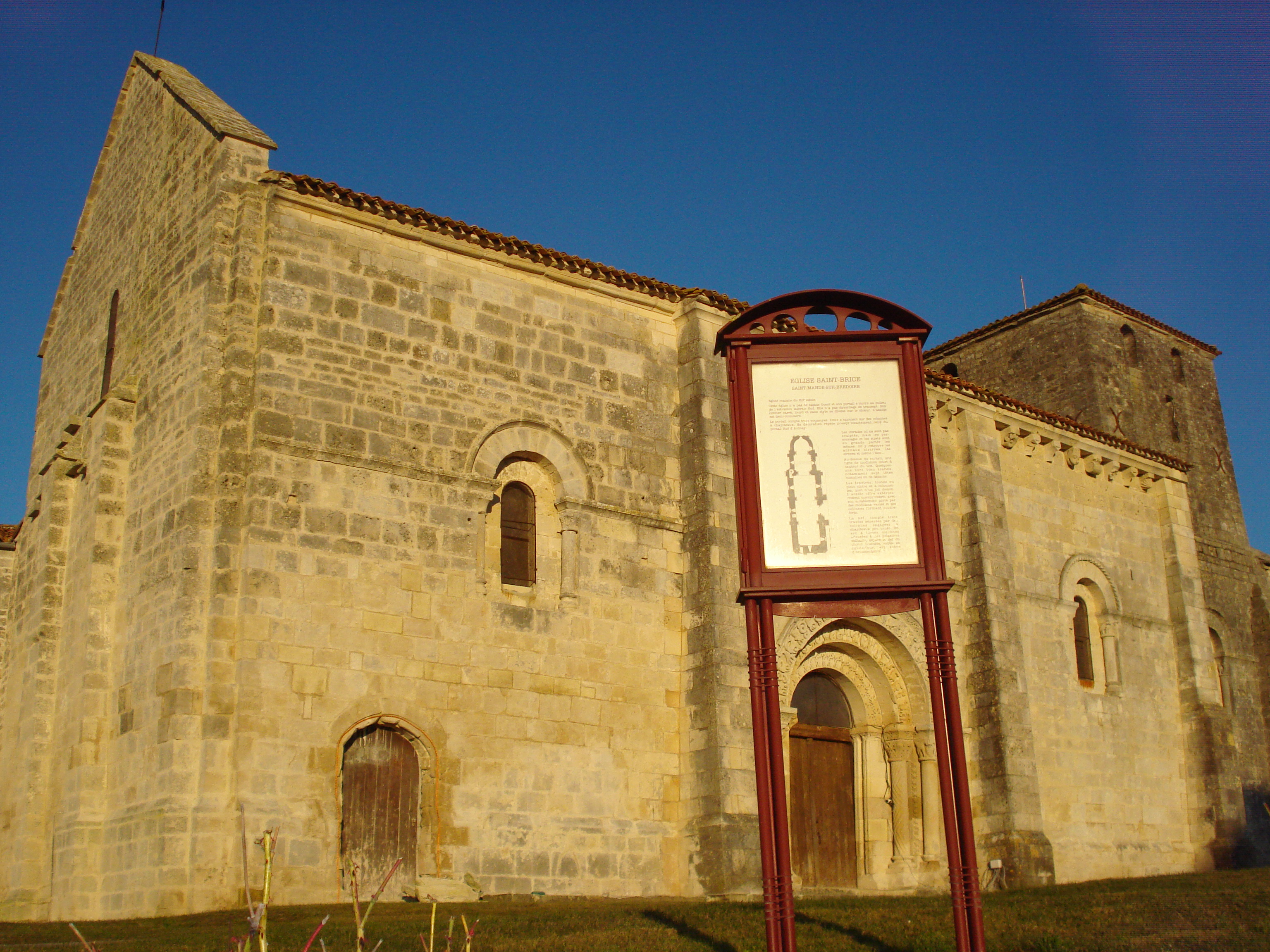 L'église